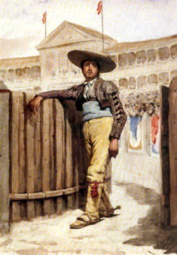 El picador de Plácido Frances Pascual